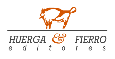 logo diseñado por nosotros. habiendo sido autorizados por los editores D. Antonio j. Huerga y Charo Fierro para su uso en redes sociales.